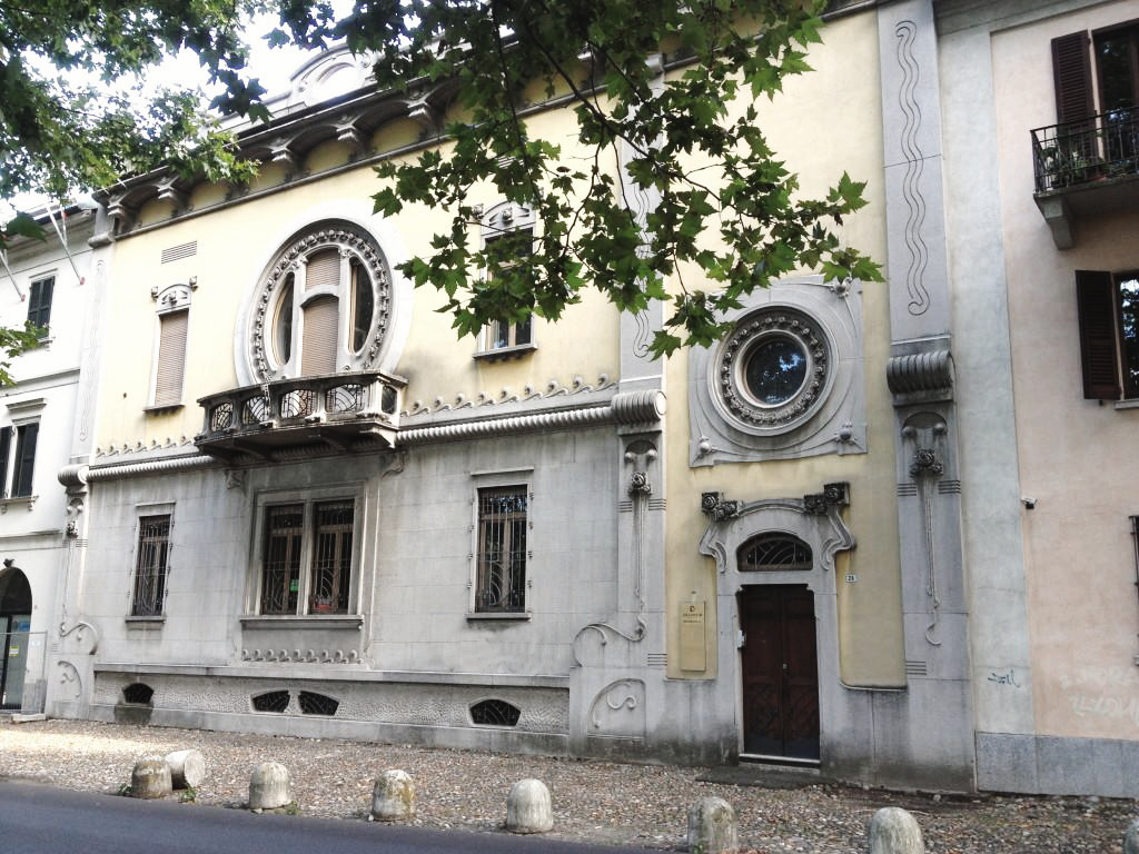 Facciata principale casa Ugazio-Quaroni